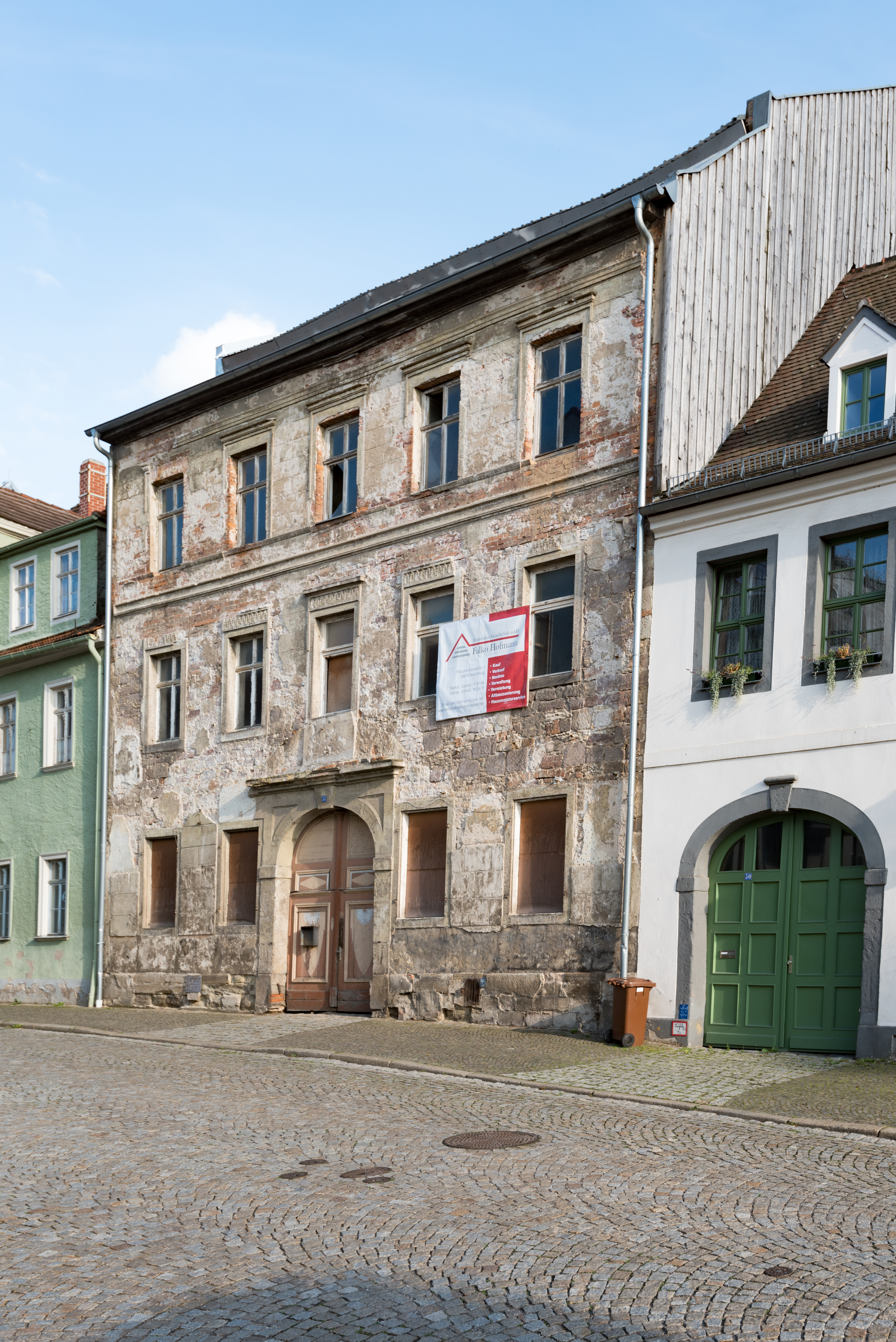 Naumburg (Saale), Neustraße 51